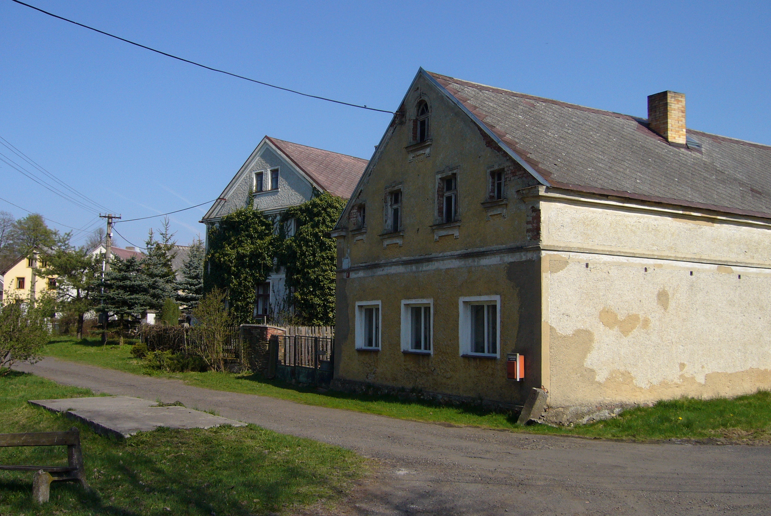 Políkno - domy v jižní části návsi